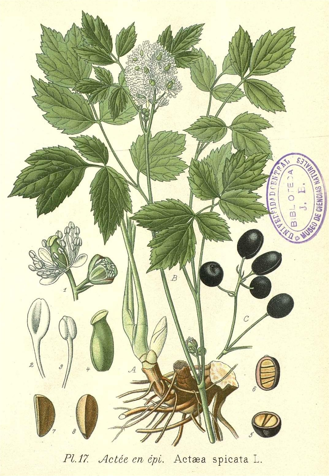 Actaea spicata